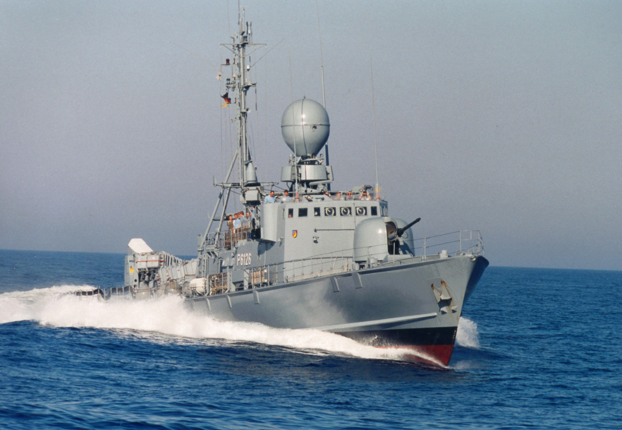 Das Schnellboot S 76 Frettchen der Gepard-Klasse bei einer Übung im Mittelmeer. ©Bundeswehr/Modes